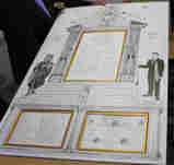 reconnaissance des compagnons Boulangers Pâtissiers par les compagnons Famille du Cuir le 16 mai 2011 à Tours